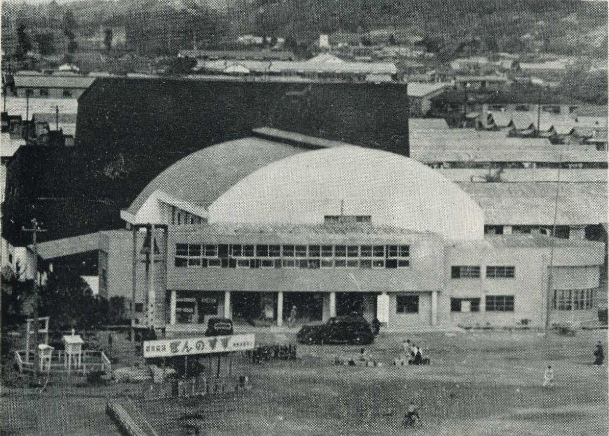 1955年の広島児童文化会館。現在の中央公園に建てられ、現存せず。